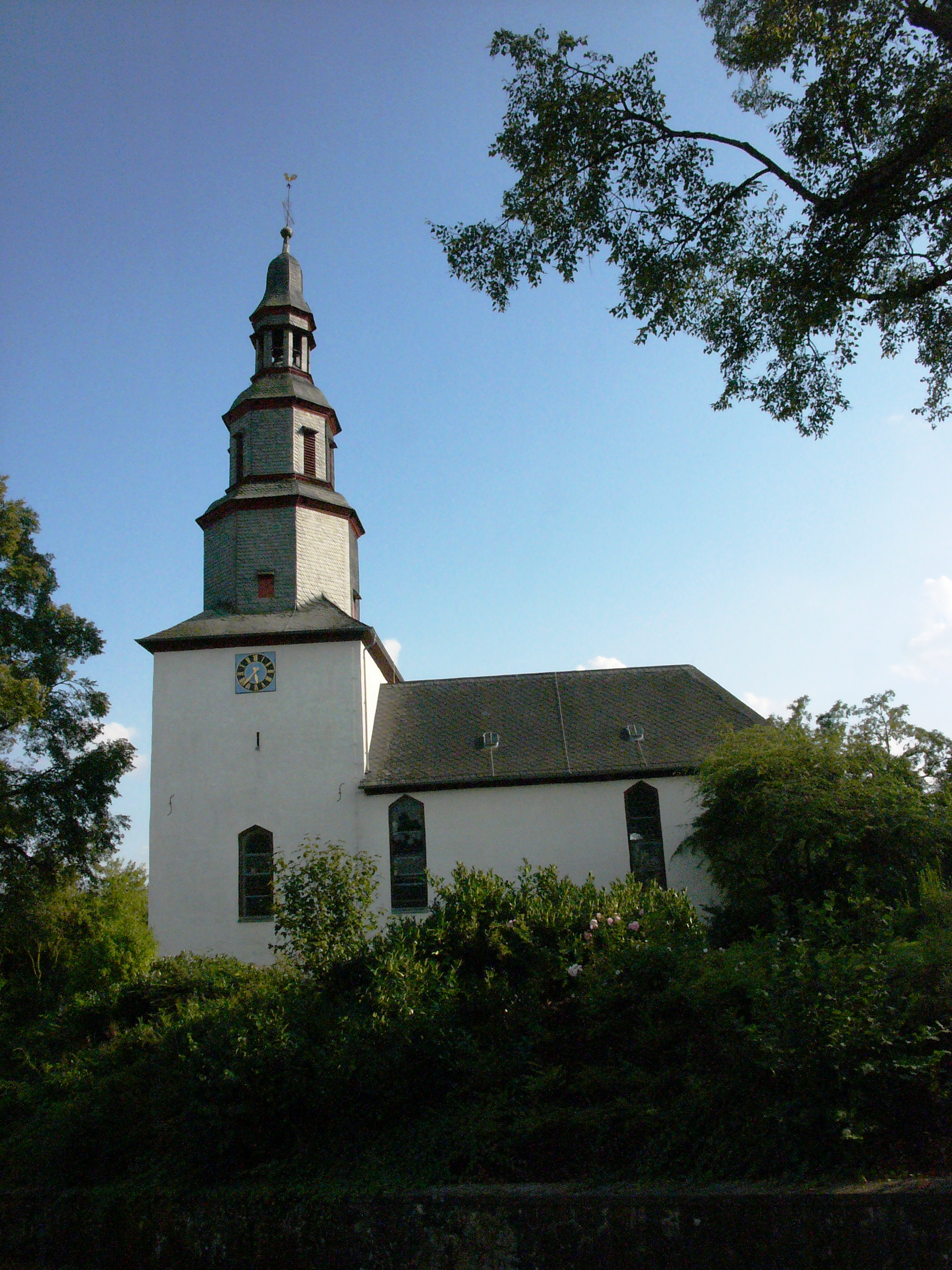 Evangelische Kirche in Solms-Niederbiel (Lahn-Dill-Kreis)